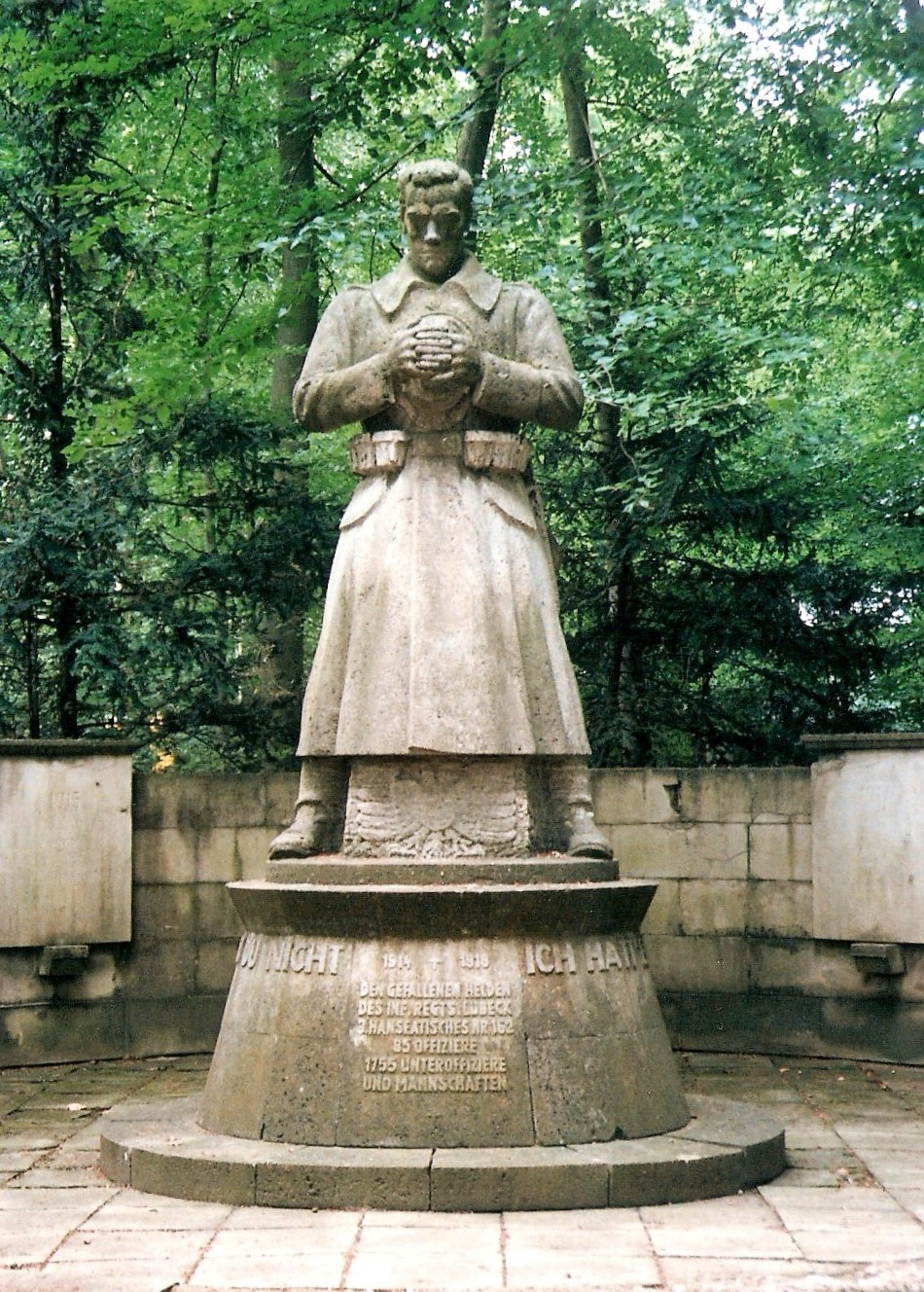 Ehrenfriedhof Lübeck / Denkmal "Helm ab zum Gebet" für die Opfer des Inf.Reg.162 im 1. Weltkrieg